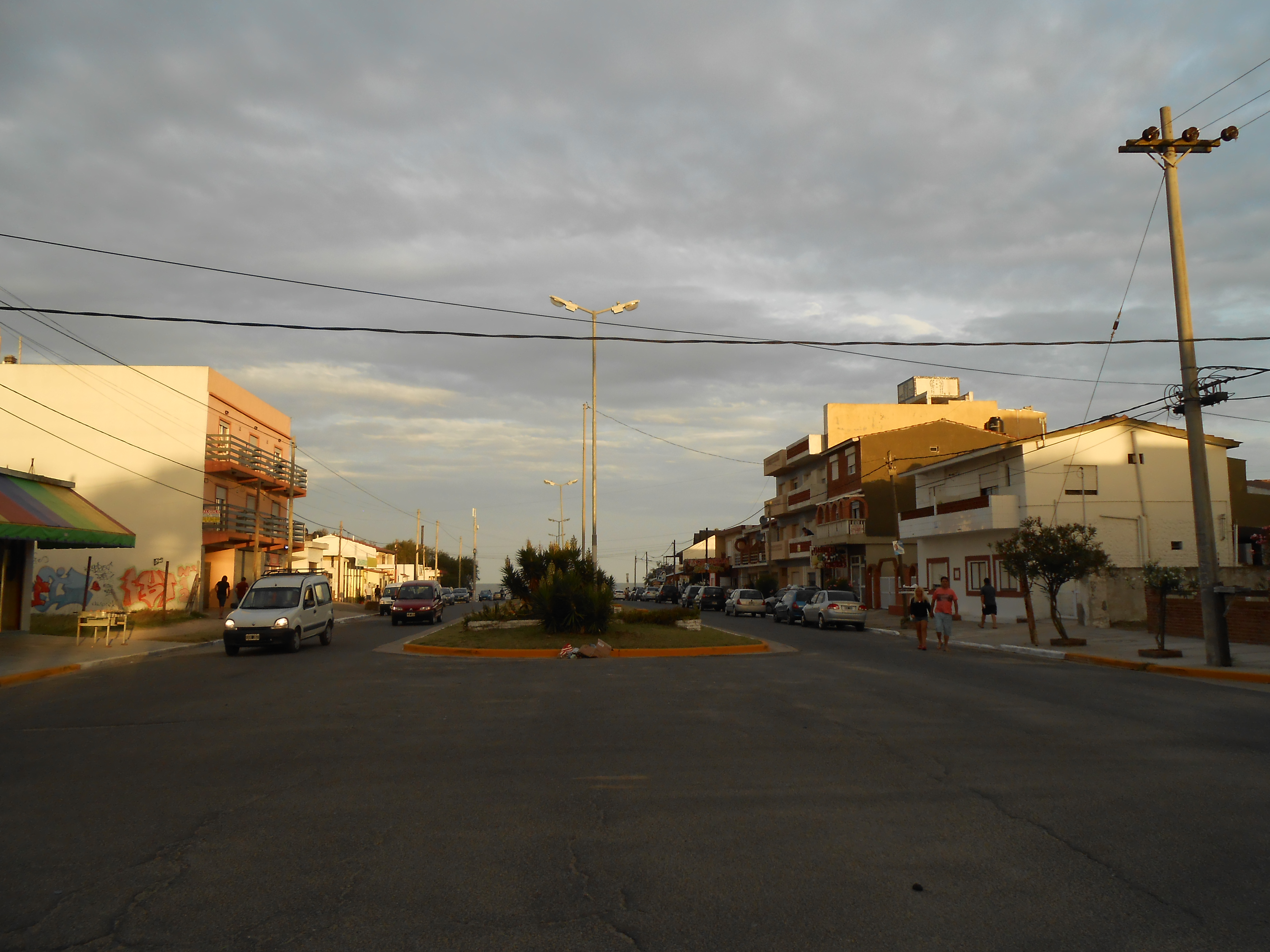 Avenida 58 que divide las ciudades de Mar del Tuyú y Santa Teresita, desde la calle 1